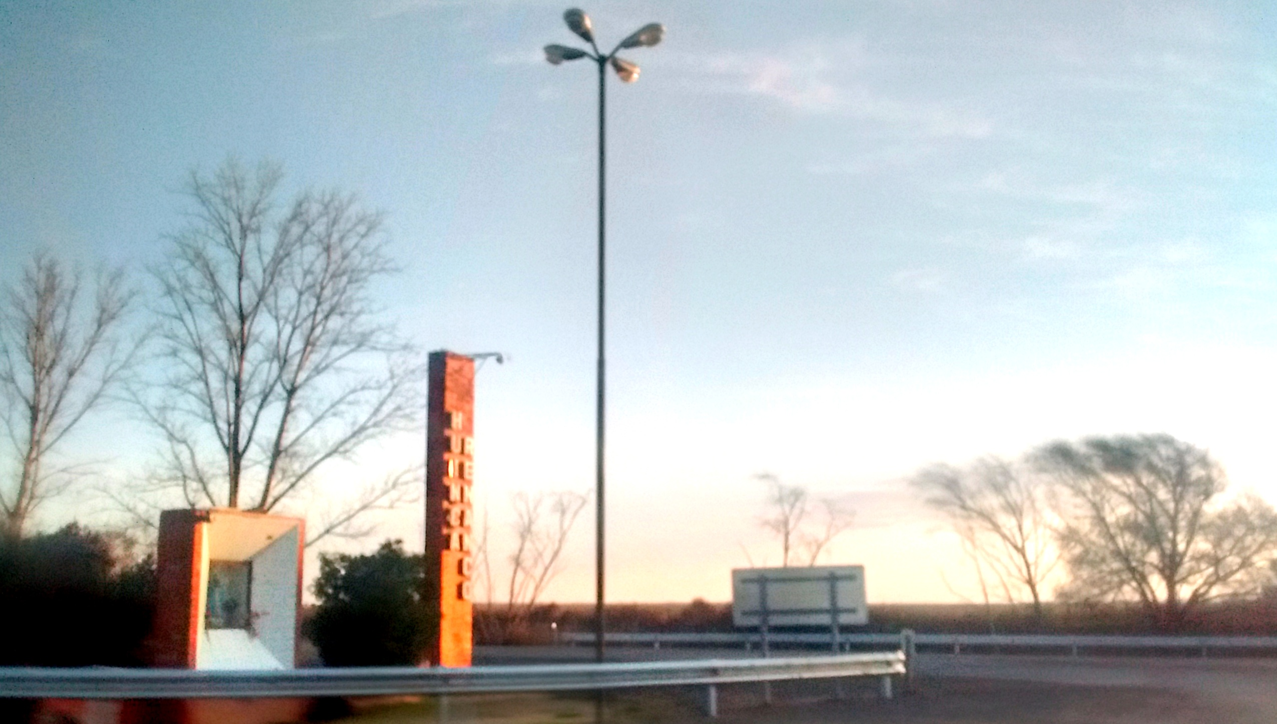 Ingreso al pueblo